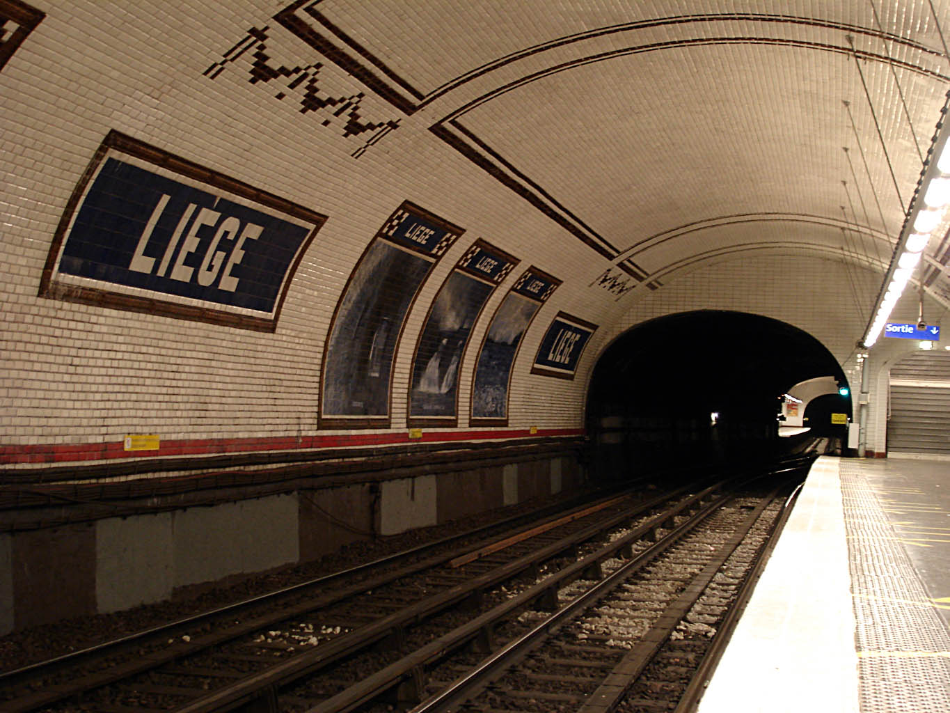 Station Liège, de la ligne 13 du métro de Paris, France.